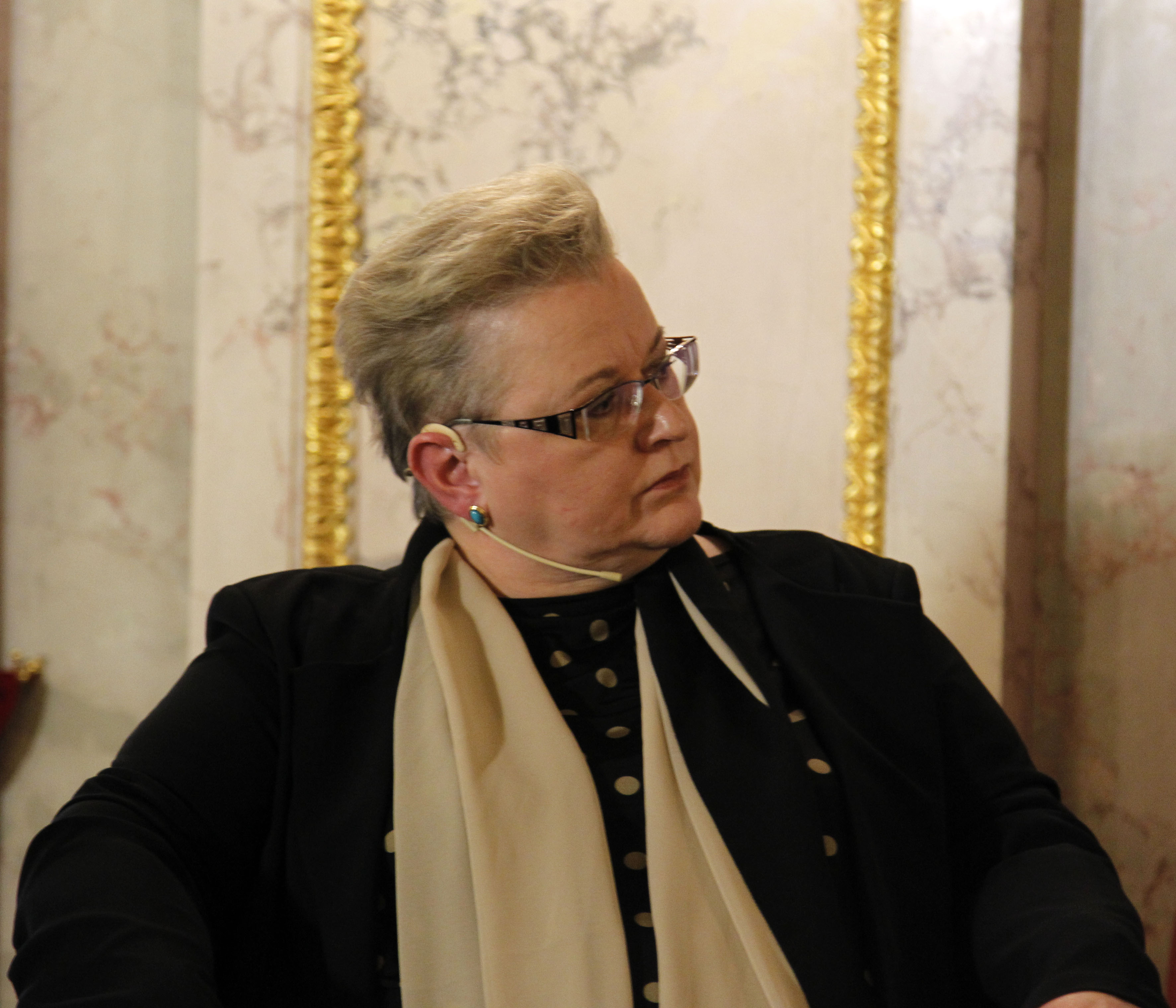 Gudrun Harrer während einer Podiumsdiskussion im Marmorsaal des österreichischen Außenministeriums.